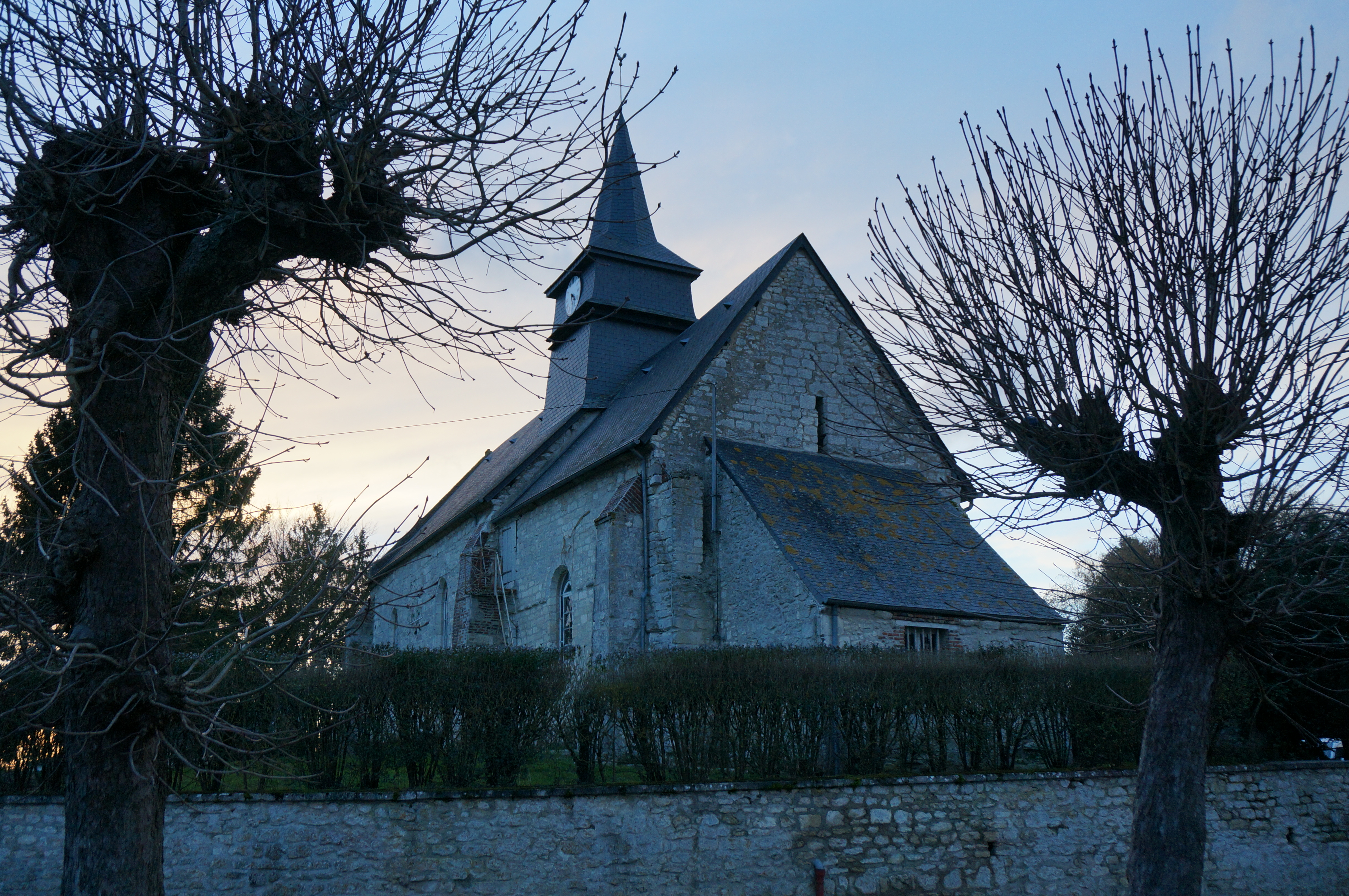 Vue de Cuirieux.